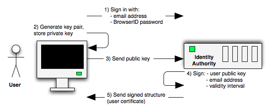 Предоставление сертификата в протоколе BrowserID